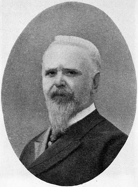 Штюрмер Борис Владимирович